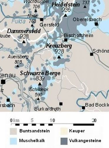 Geologische Karte der Südlichen Hohen Rhön